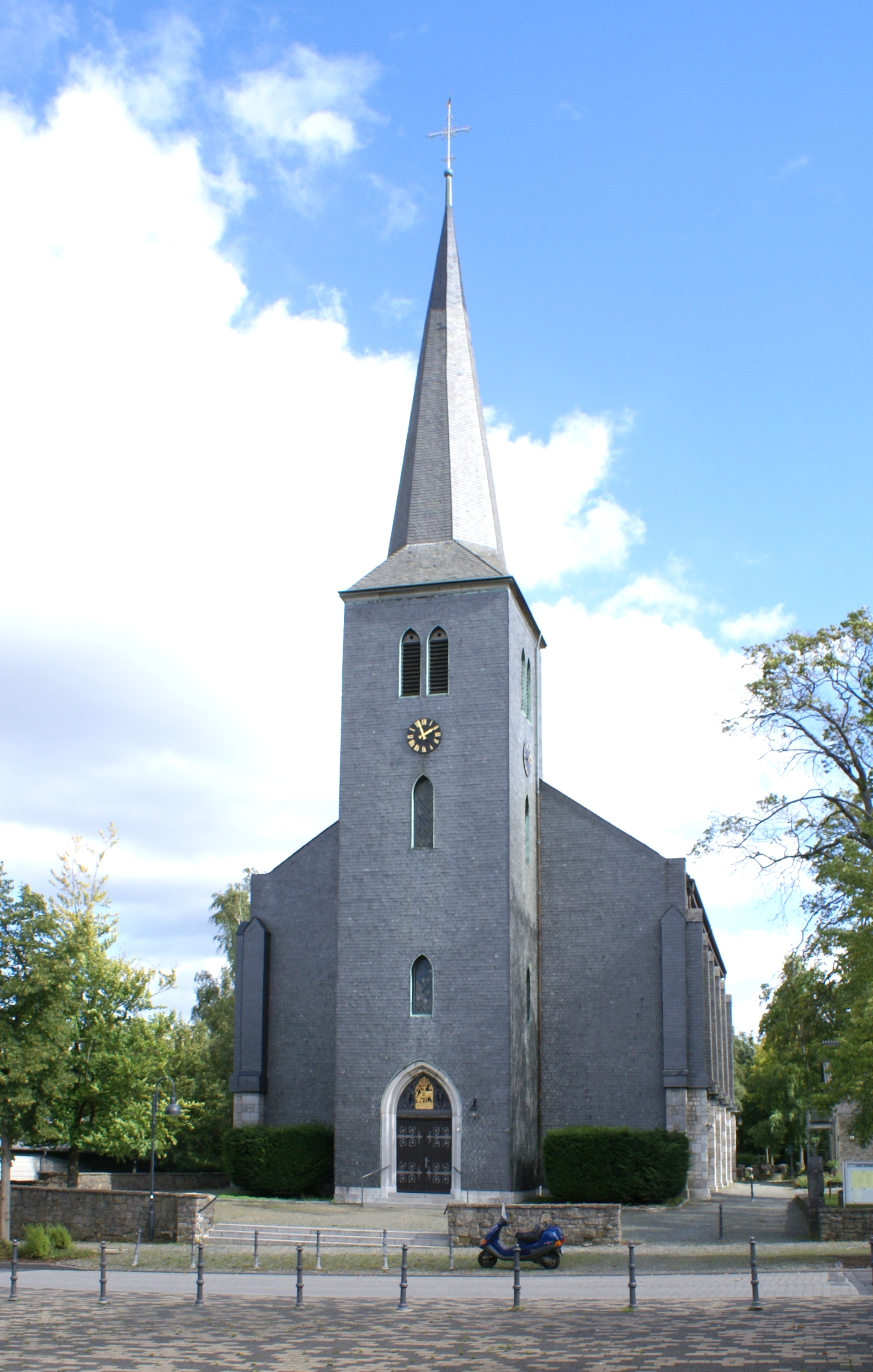 Roetgen Hauptstraße 66 Katholische HallenkircheThis is a photograph of an architectural monument., no. 45